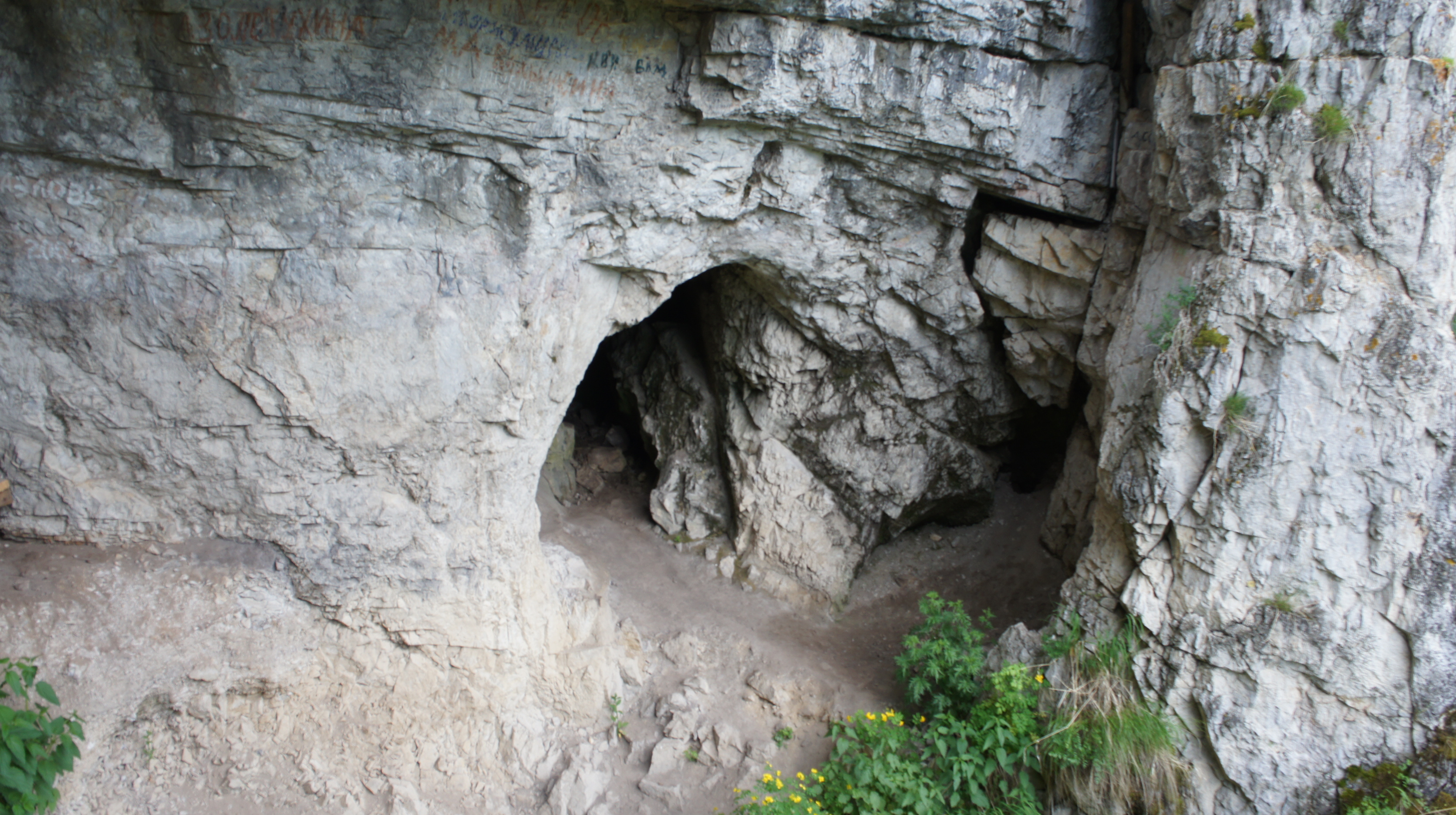 "Ноздри" Денисовой пещеры